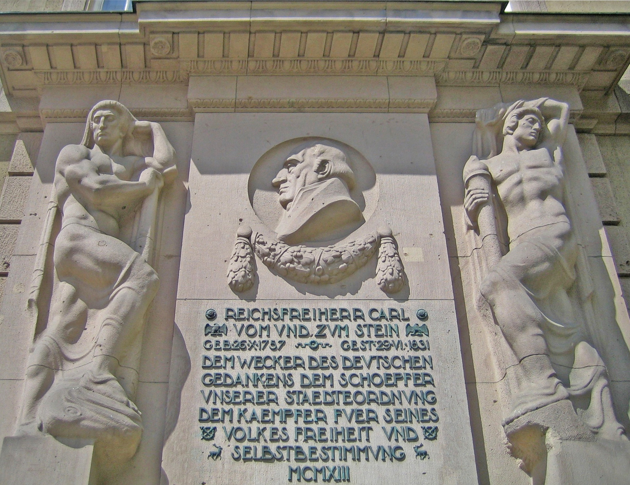 Berlin, Rathaus Schöneberg. Relief von Hugo Lederer zu Ehren des Reichsfreiherrn Carl von und zum Stein, datiert 1913.